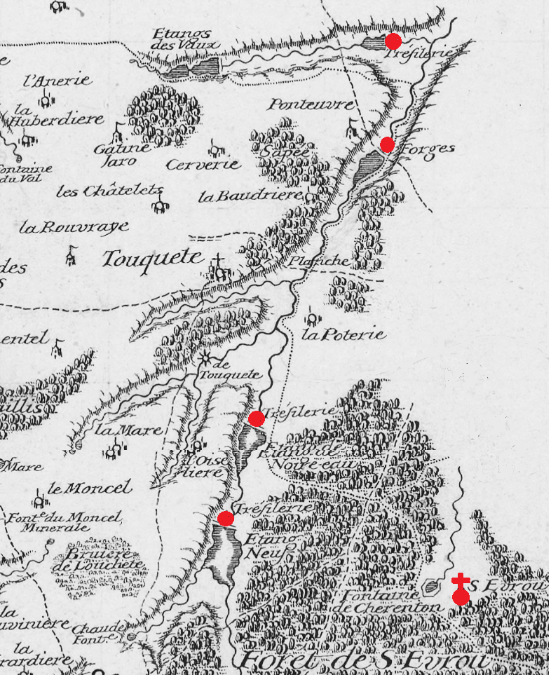 Abbaye de Saint-Evroult, Orne, carte des forges (gravure ancienne retouchée